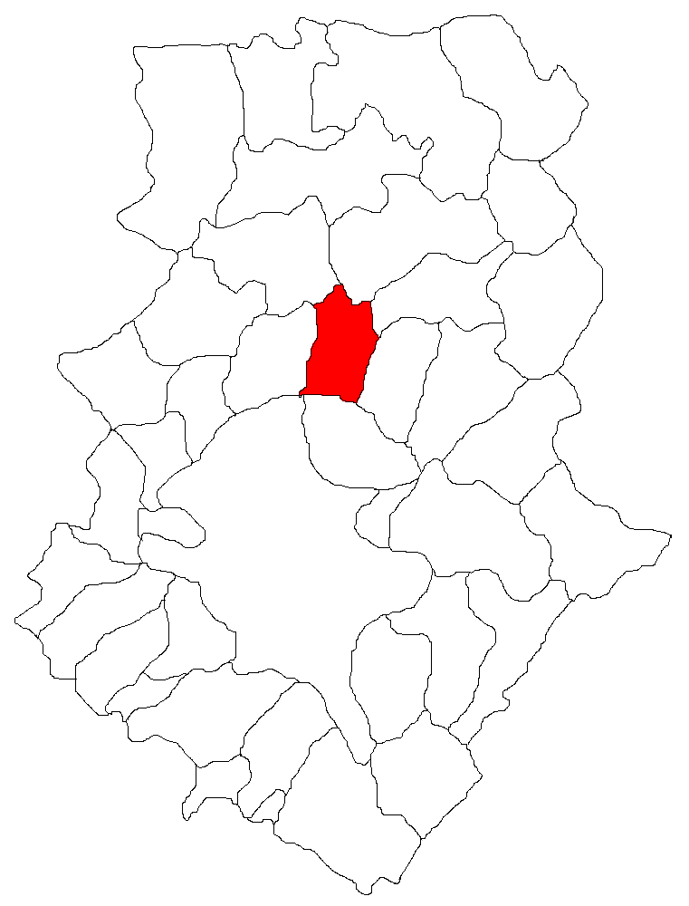 Volapük: Topam in ziläk: Ilfov.